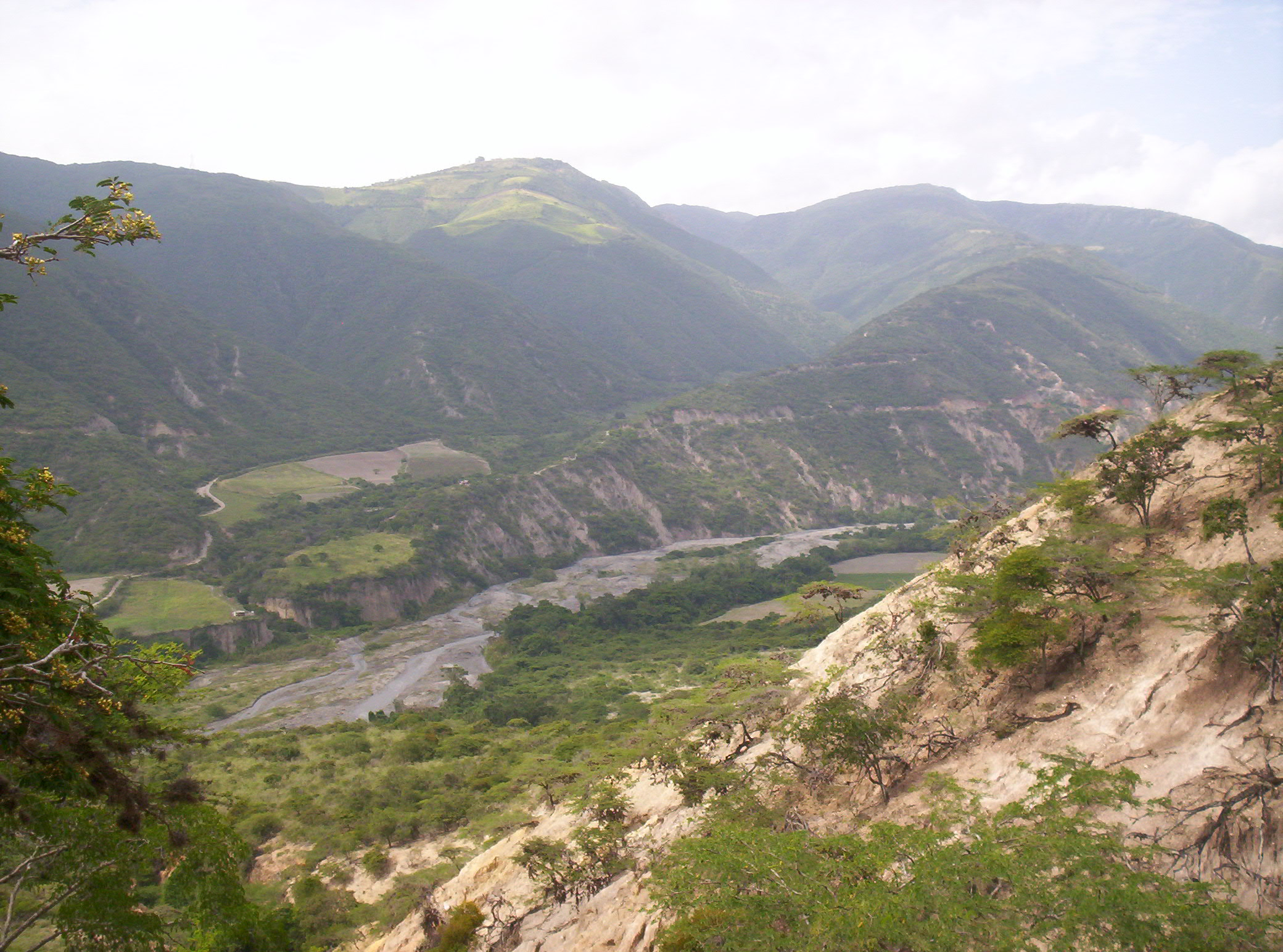 este es el camino hacia el monumento natural loma de león , donde te encontraras con una gran variedad de especies vegetales y animales.